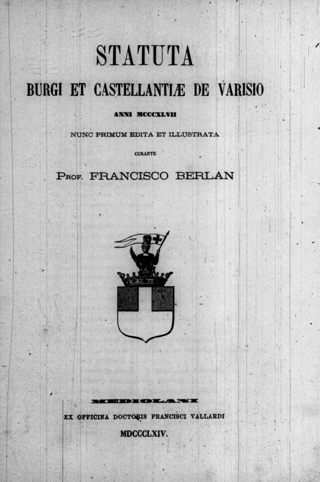 Frontespizio